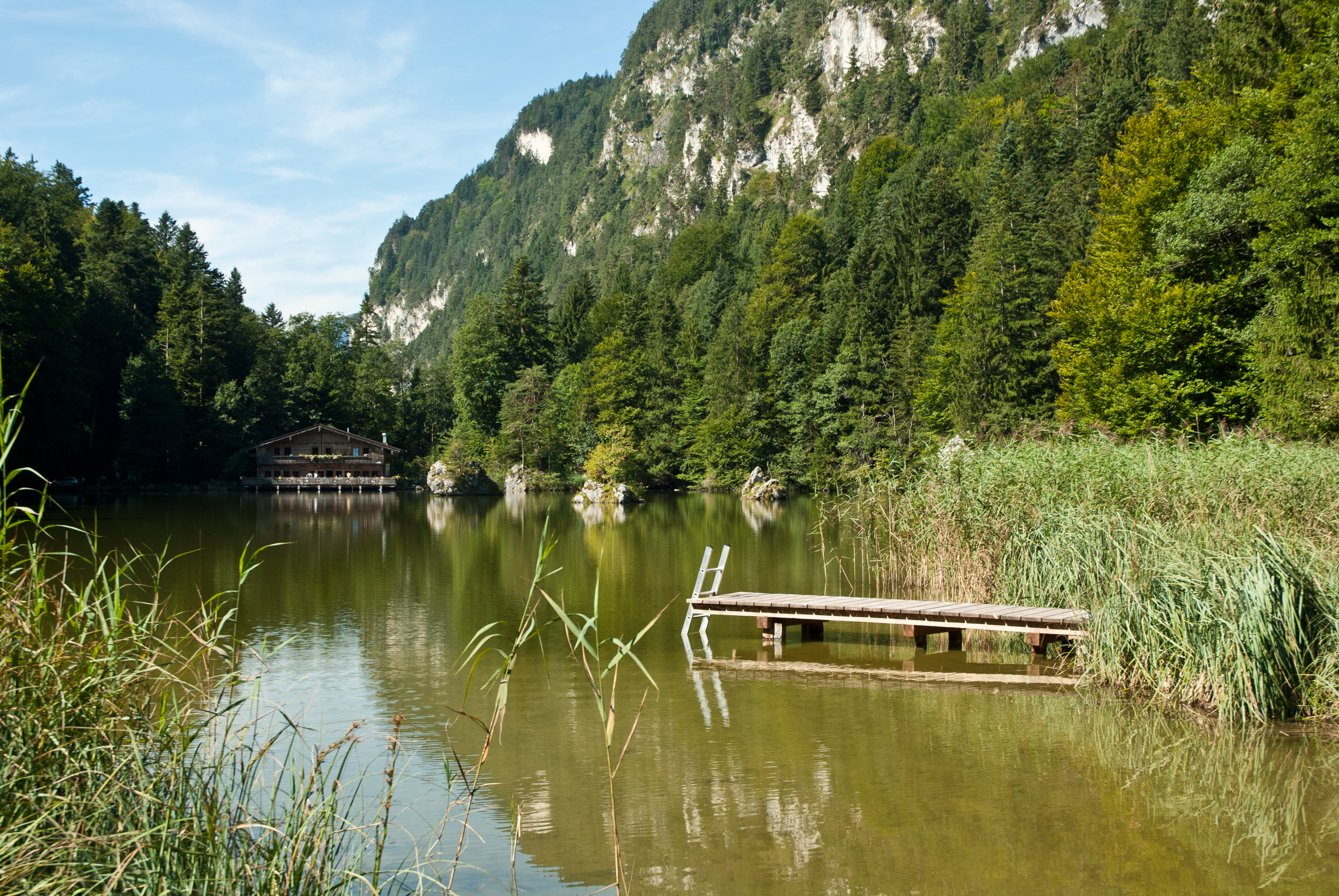 Berglsteiner See from NE